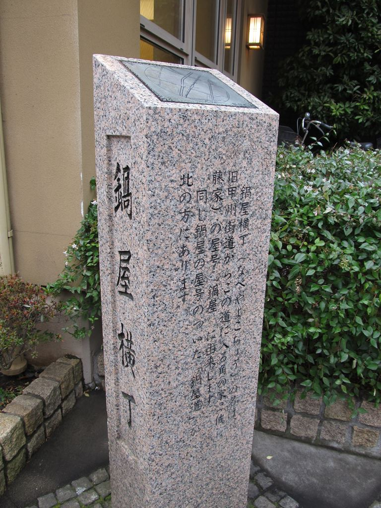 鍋屋横丁。東京都府中市八幡町、八幡町交差点。